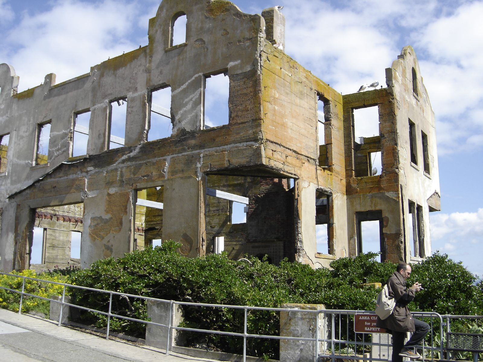 Wardens House